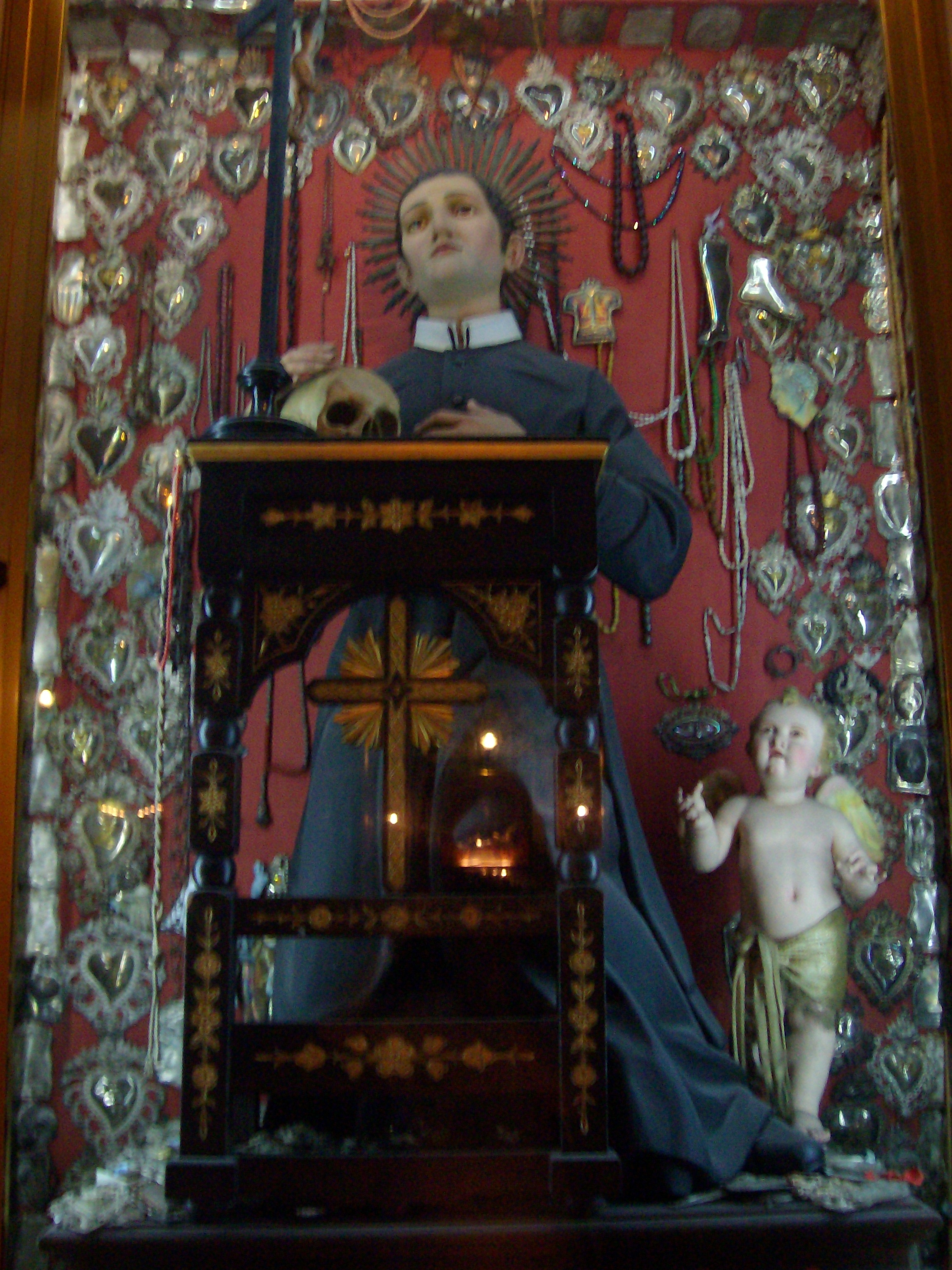 San Gerardo Maiella, chiesa di Santa Brigida, Napoli, opera anteriore al 1905.